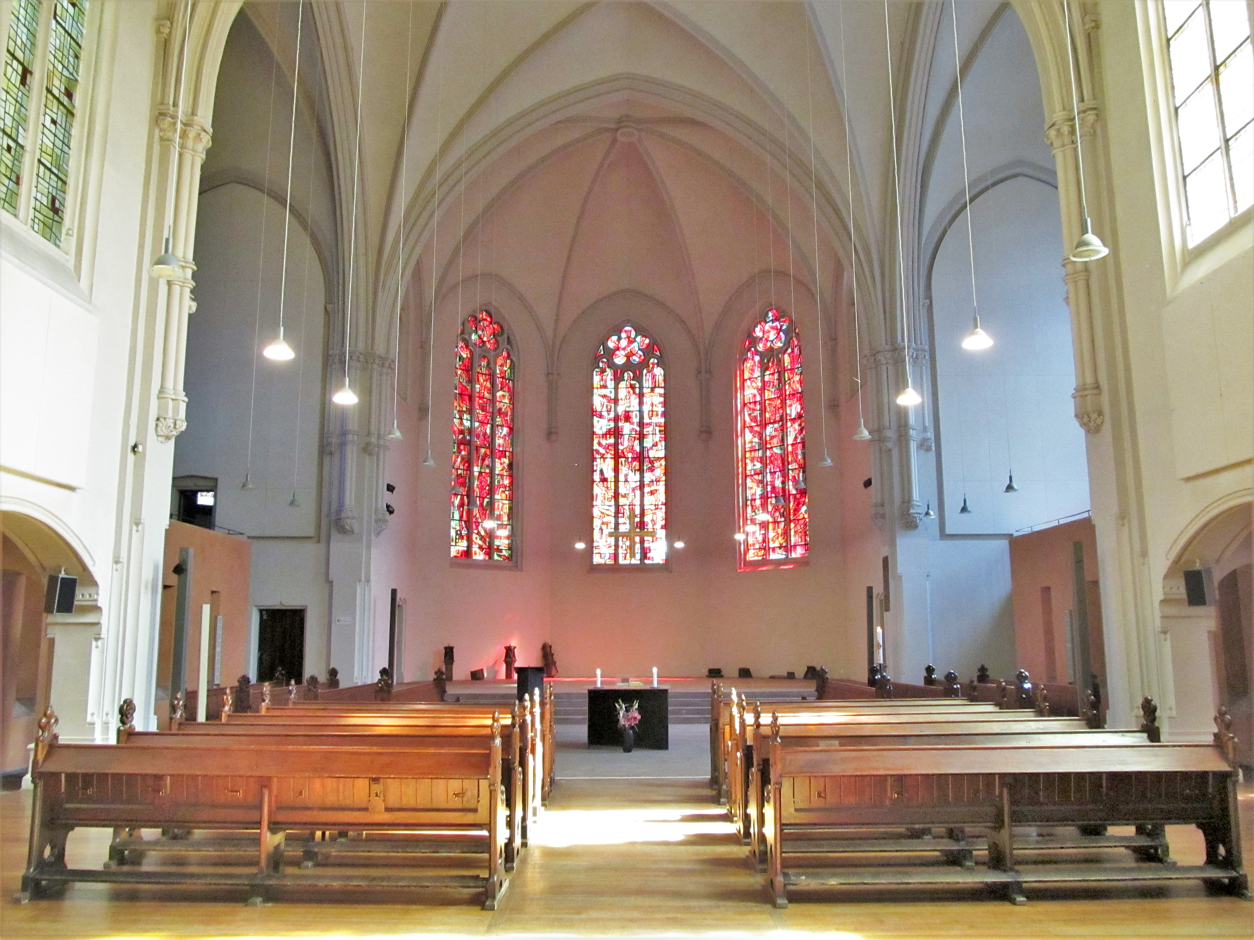 Blick ins Innere der Johanneskirche in Saarbrücken, Saarland